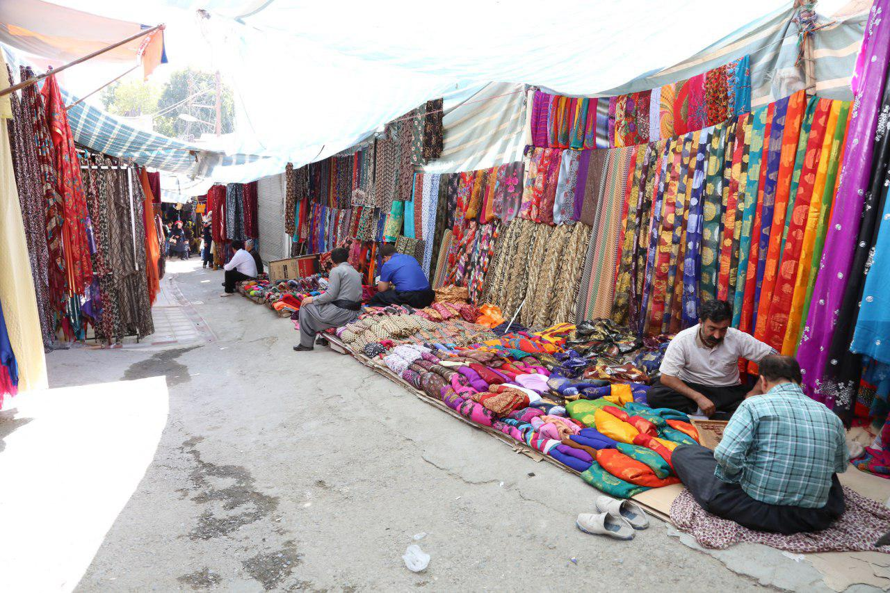 بازار در سنندج